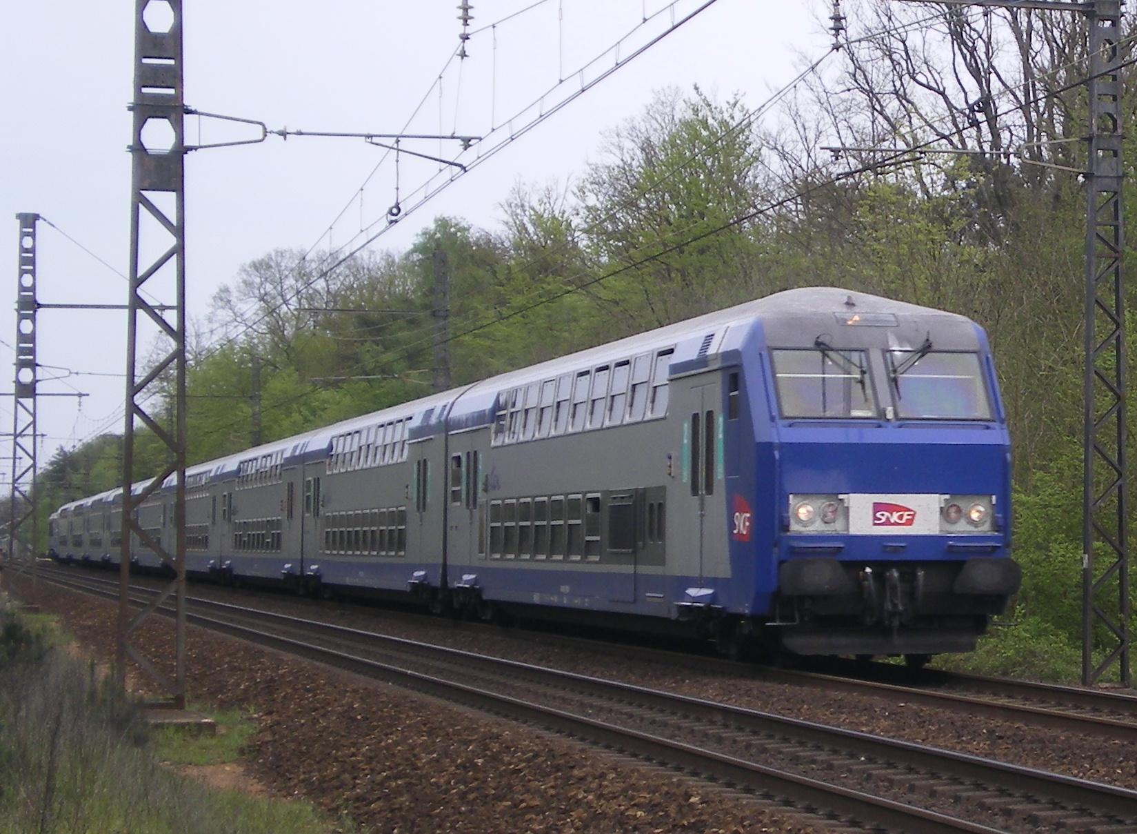 Voiture pilote V2N TER Bourgogne